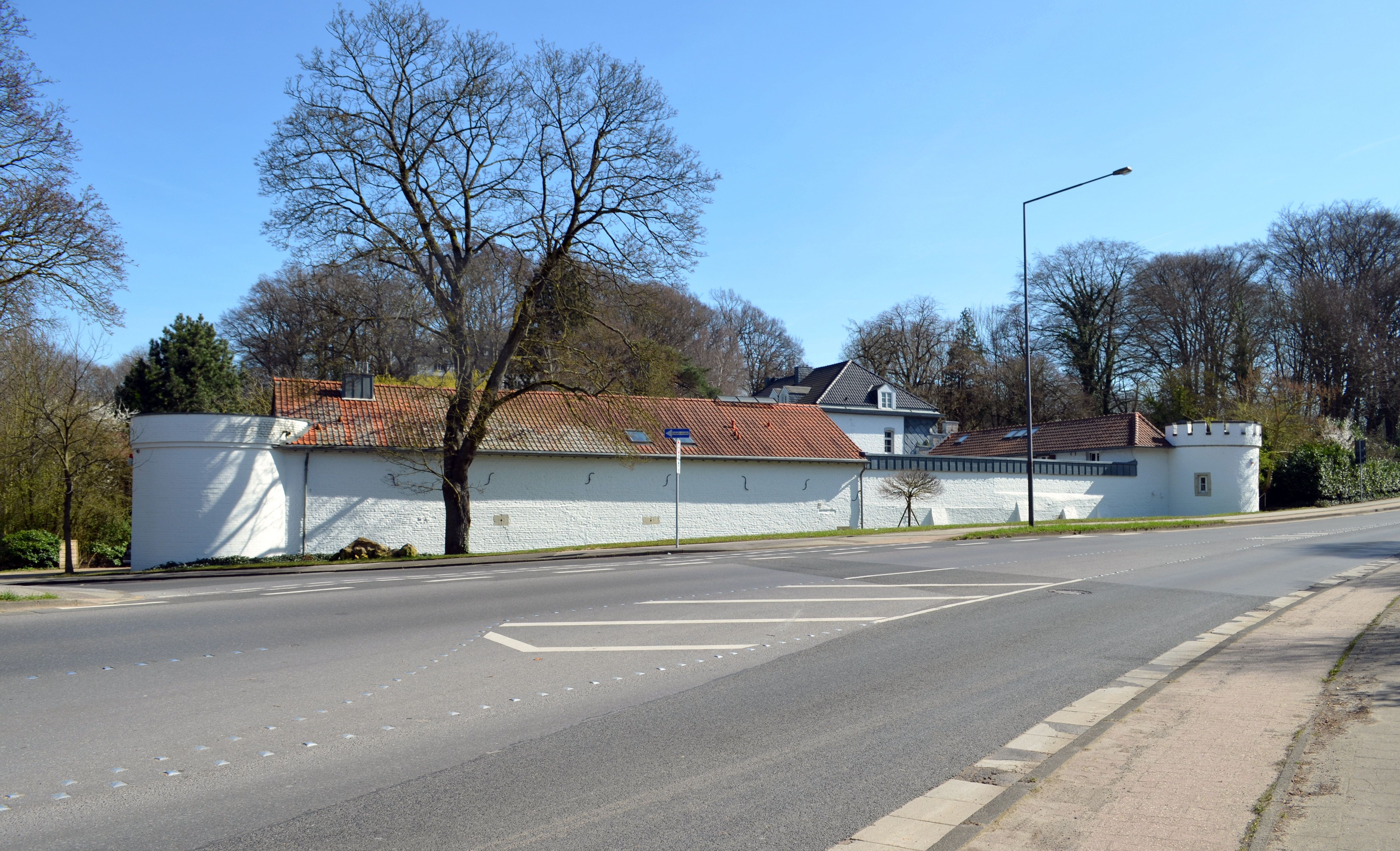 Der Colynshof in Aachen